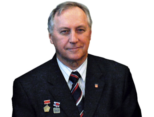 Юрий Зосимович Балакшин